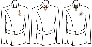 Modo di indossare le decorazioni dell'Ordine della Stella della Solidarietà (Italia)